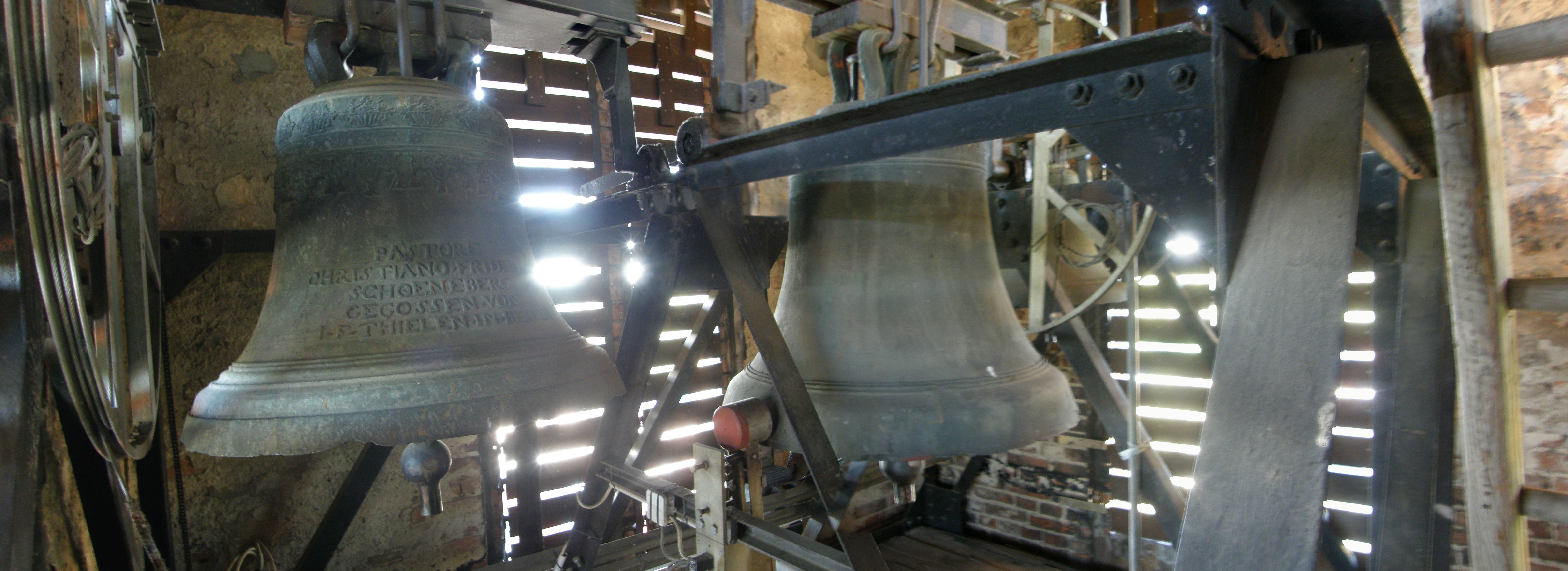 Berlin-Kaulsdorf, Jesuskirche: Geläut gesamt